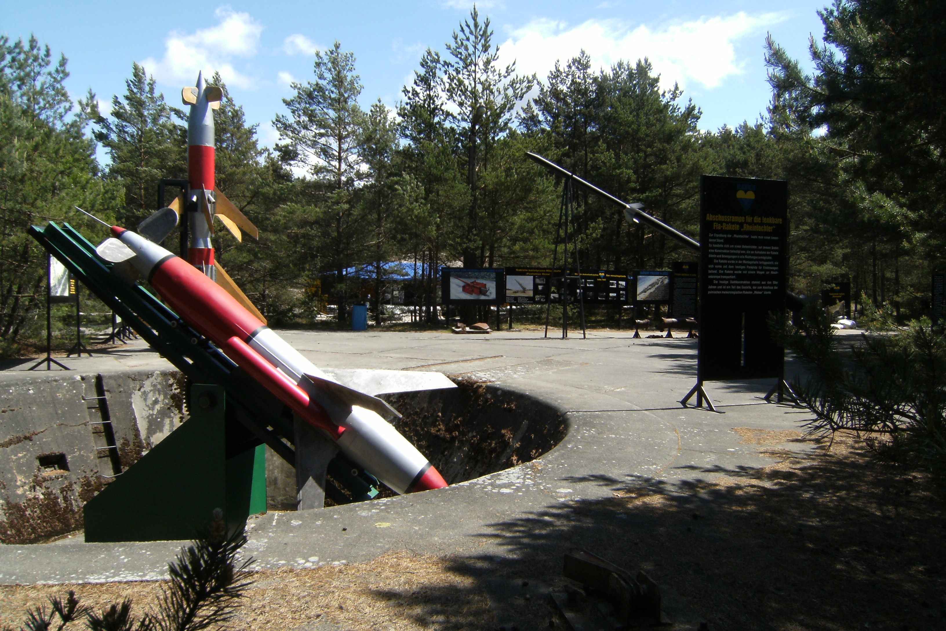 Raketenprüfstelle Rumbke bei Leba - Museum